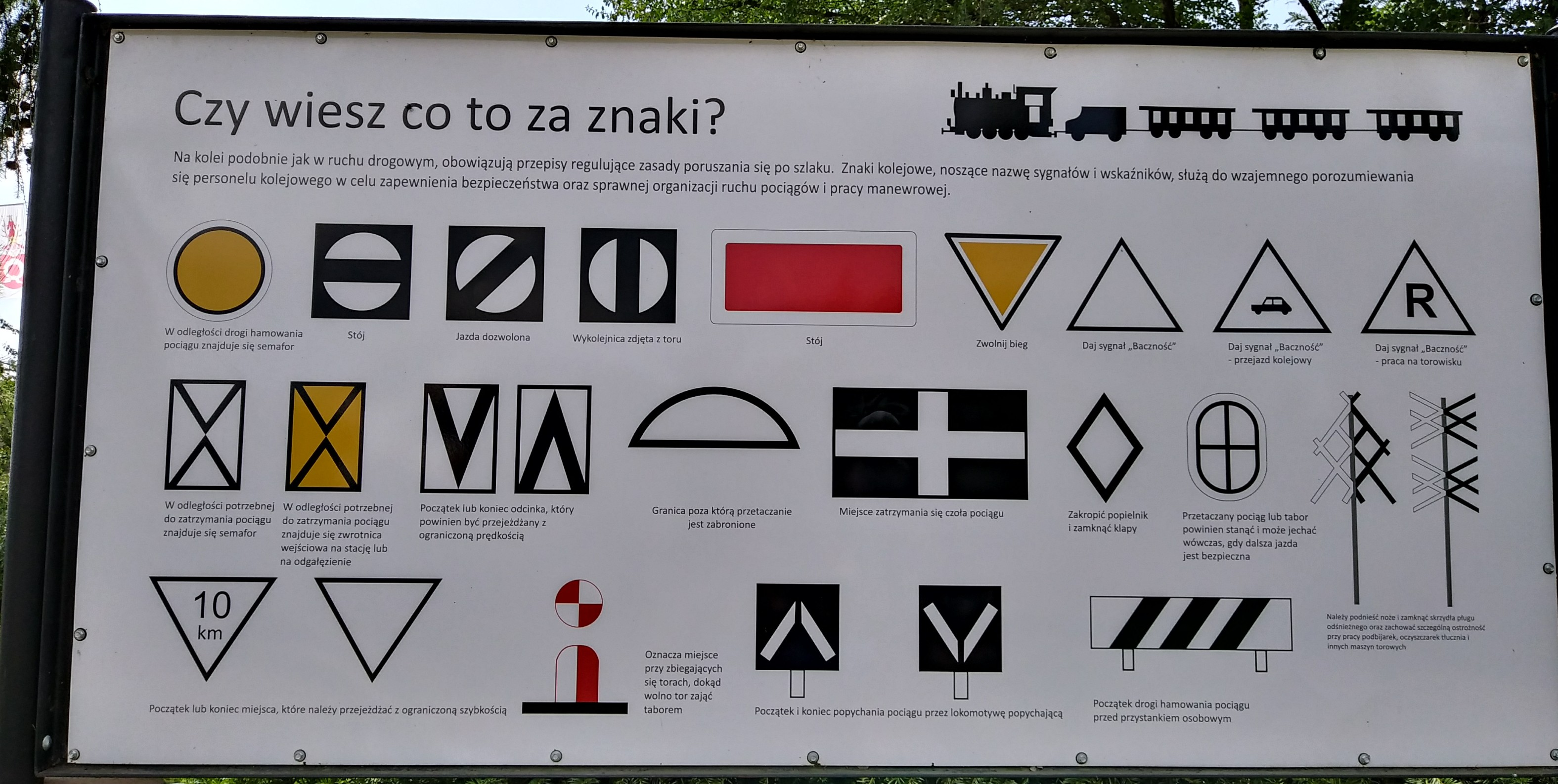 Tablica informacyjna w Muzeum Kolei Wąskotorowej w Wenecji koło Żnina poświęcona wskaźnikom i sygnałom kolejowym.